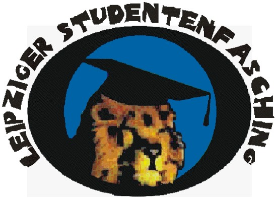 Logo des Leipziger Studentenfasching (seit Dezember 2005)